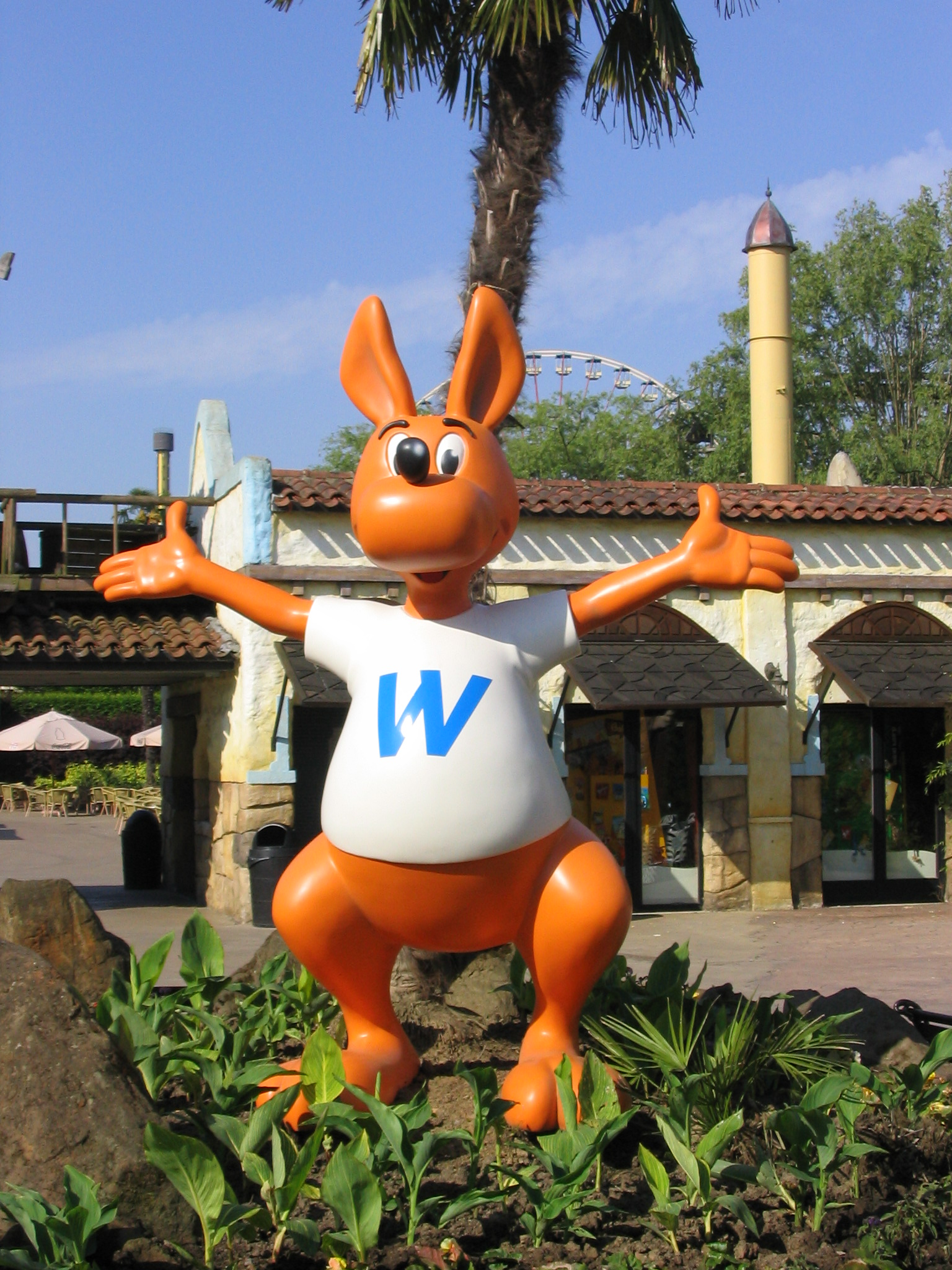 Park Mascot at Walibi Belgium